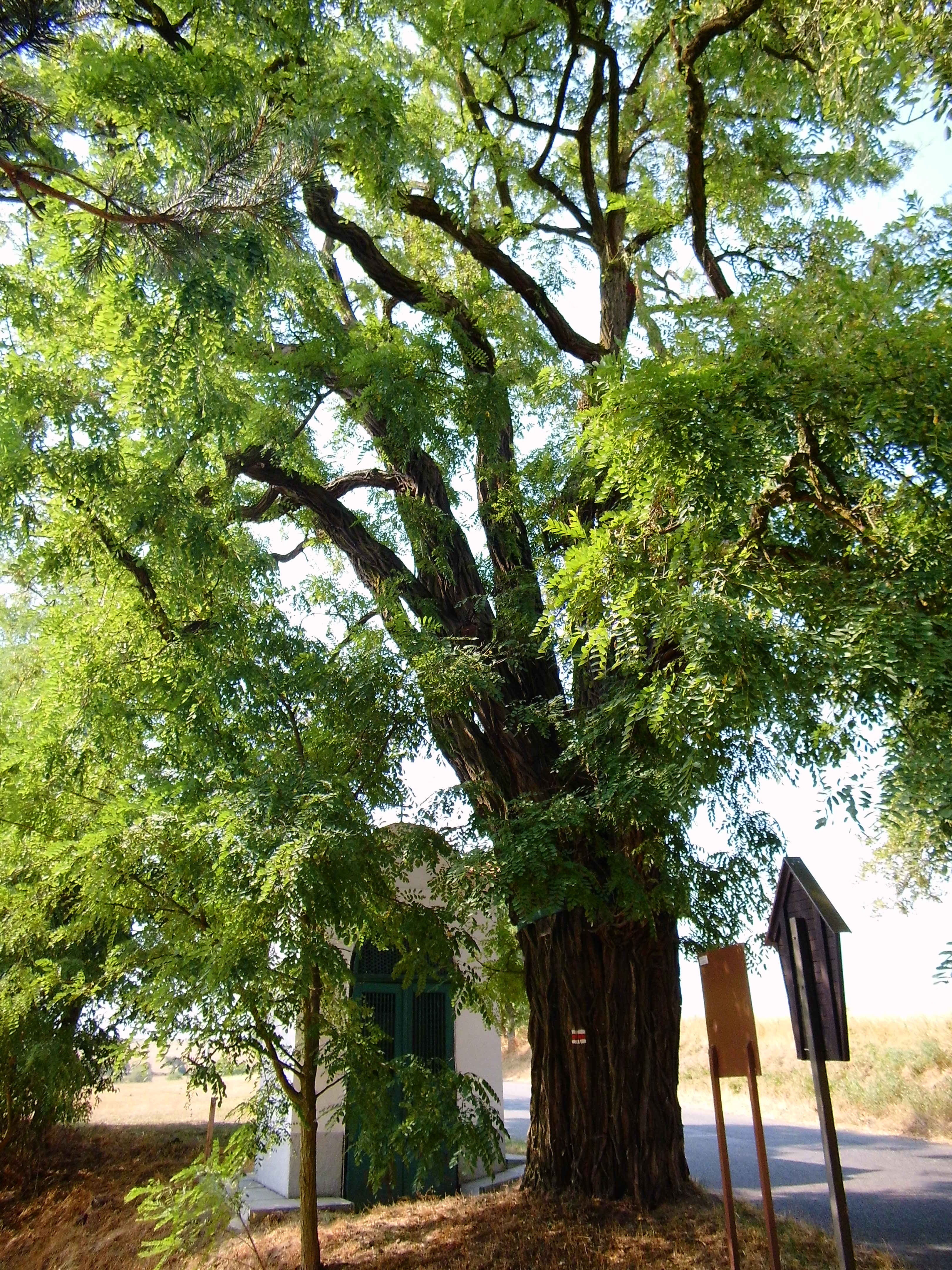 Kasejovický akát, památný strom